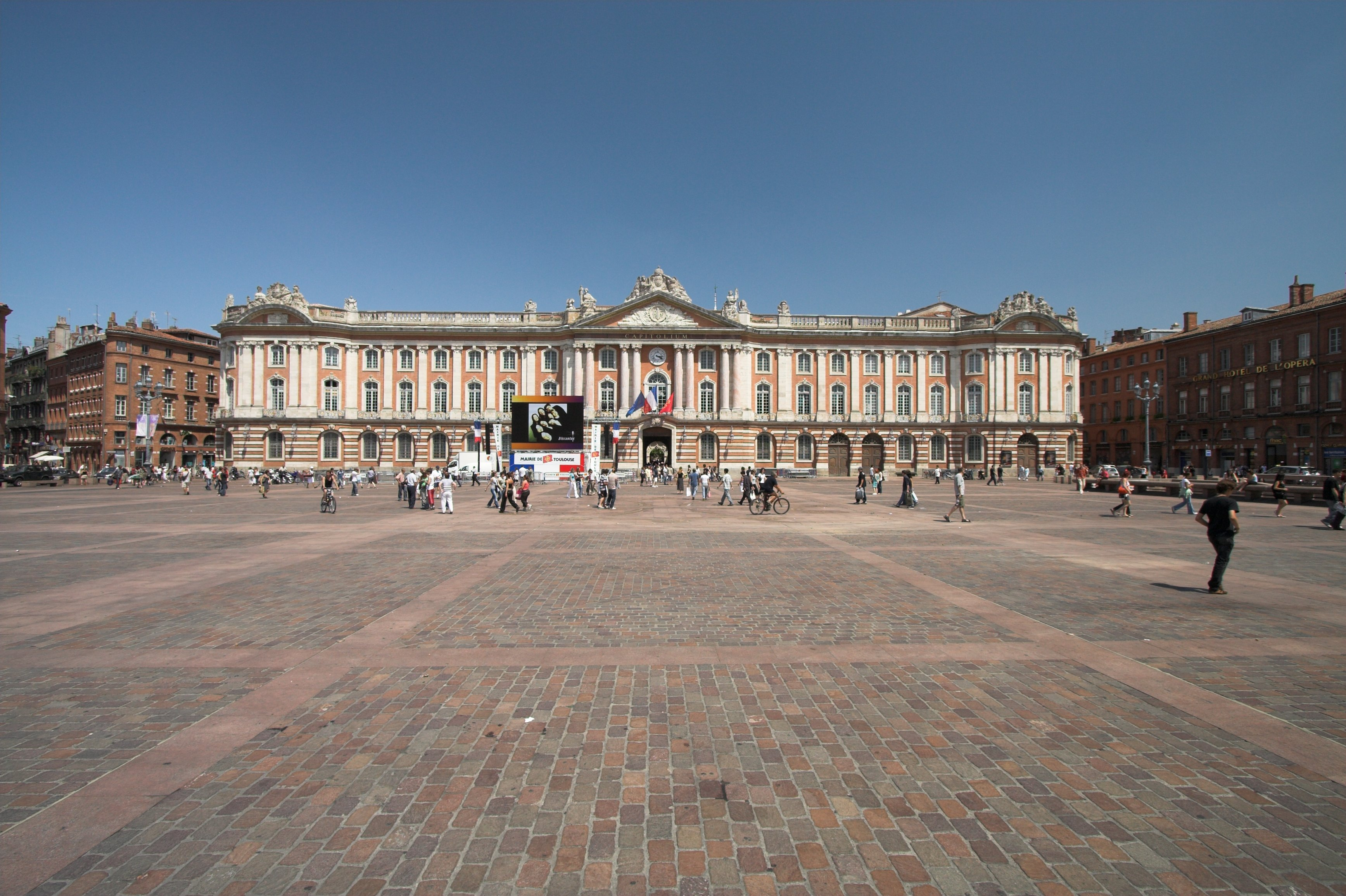 Place du capitole(Toulouse, France)